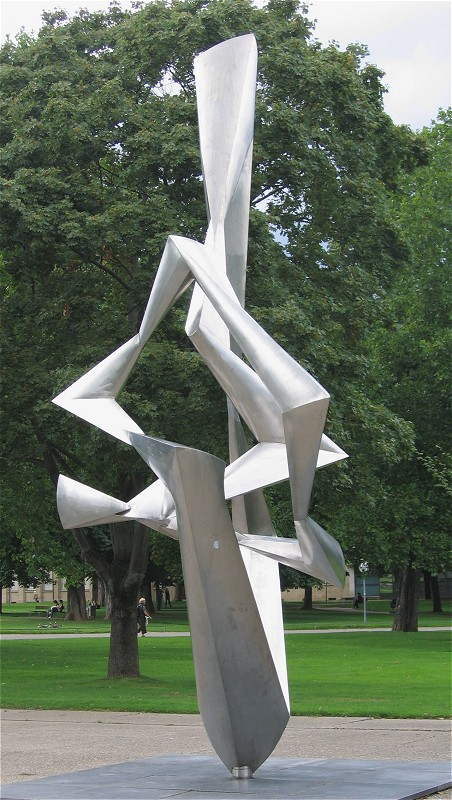 Wander Bertoni: Metallskulptur 1961 Schlossplatz in Stuttgart (Öffentlicher Platz)